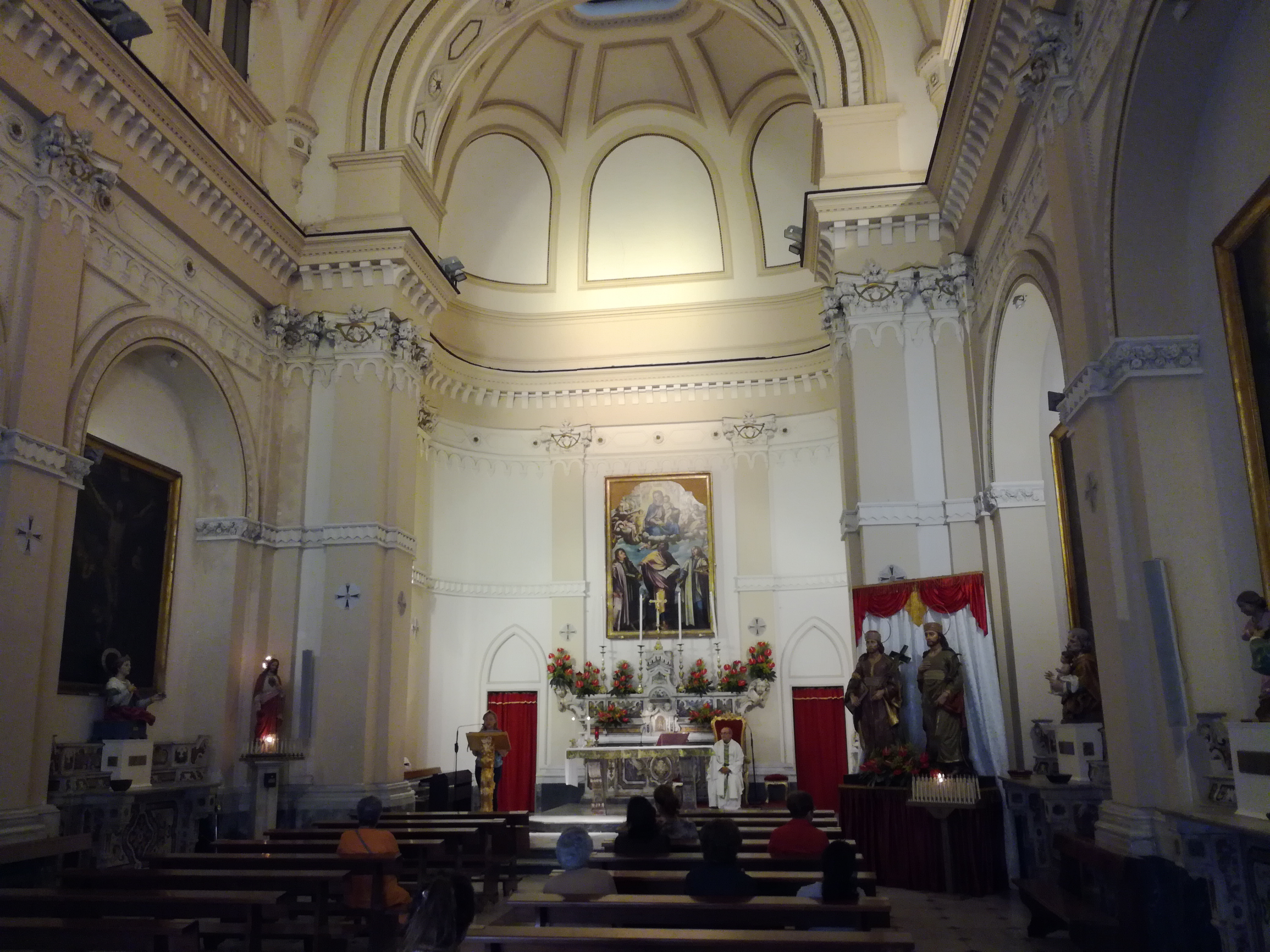 Interno Cosma e Damiano